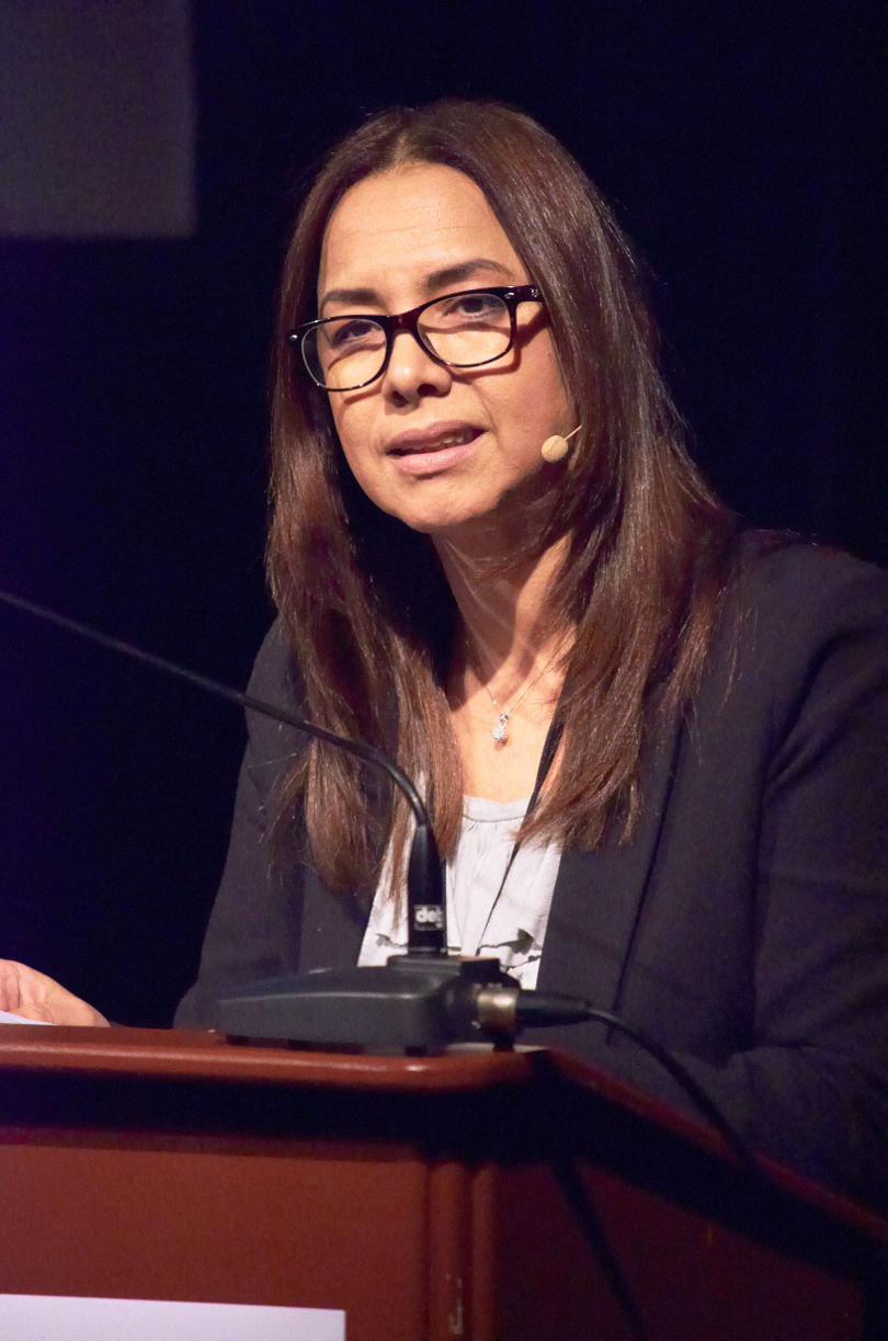 َAicha Elbasri